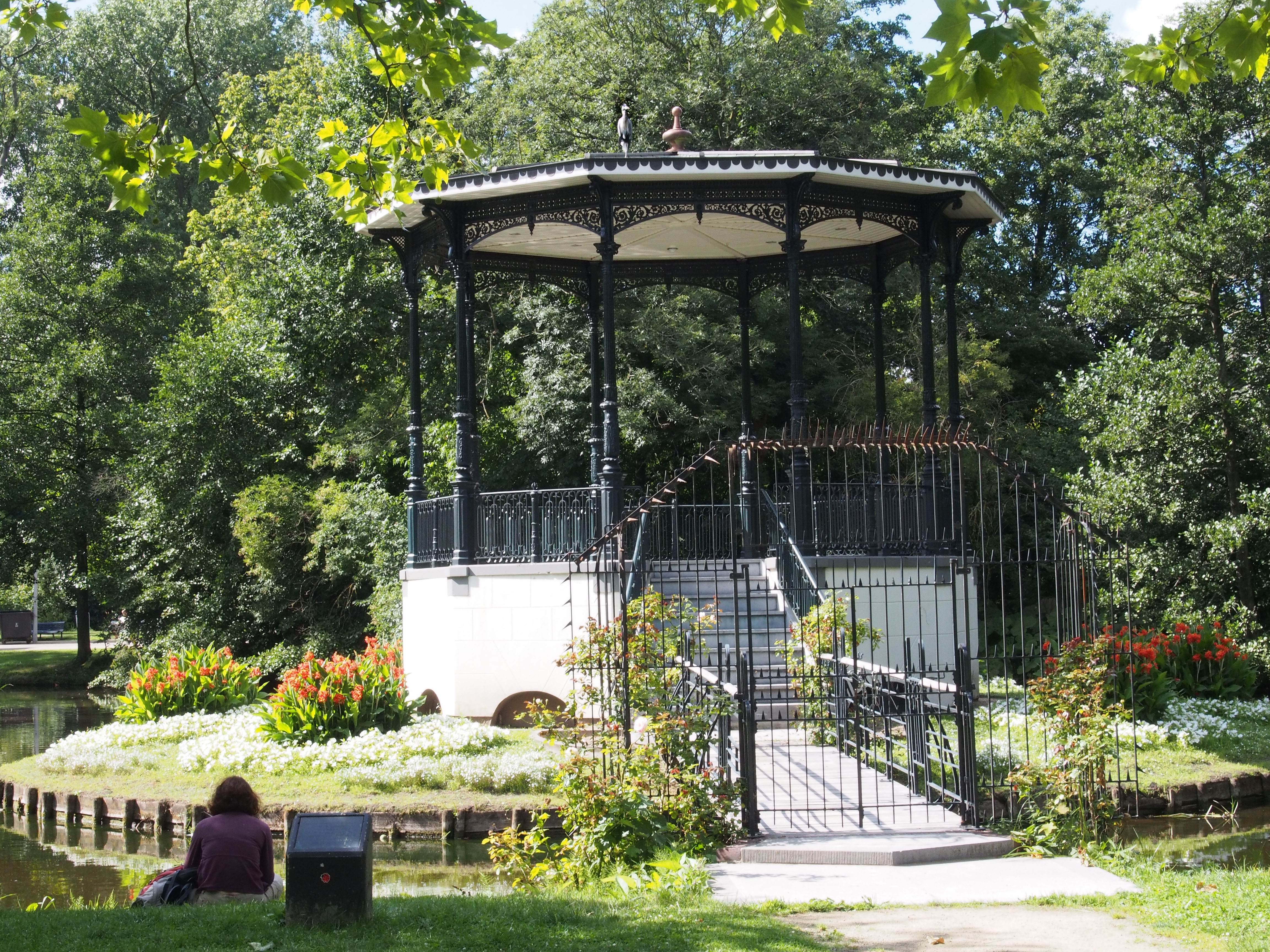 Plafond Muziektent